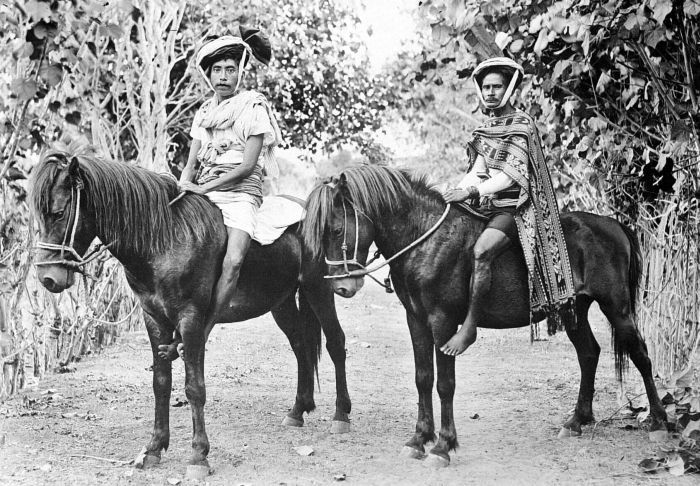 Repronegatief. Twee Soembanezen op hun sandelhoutpaard